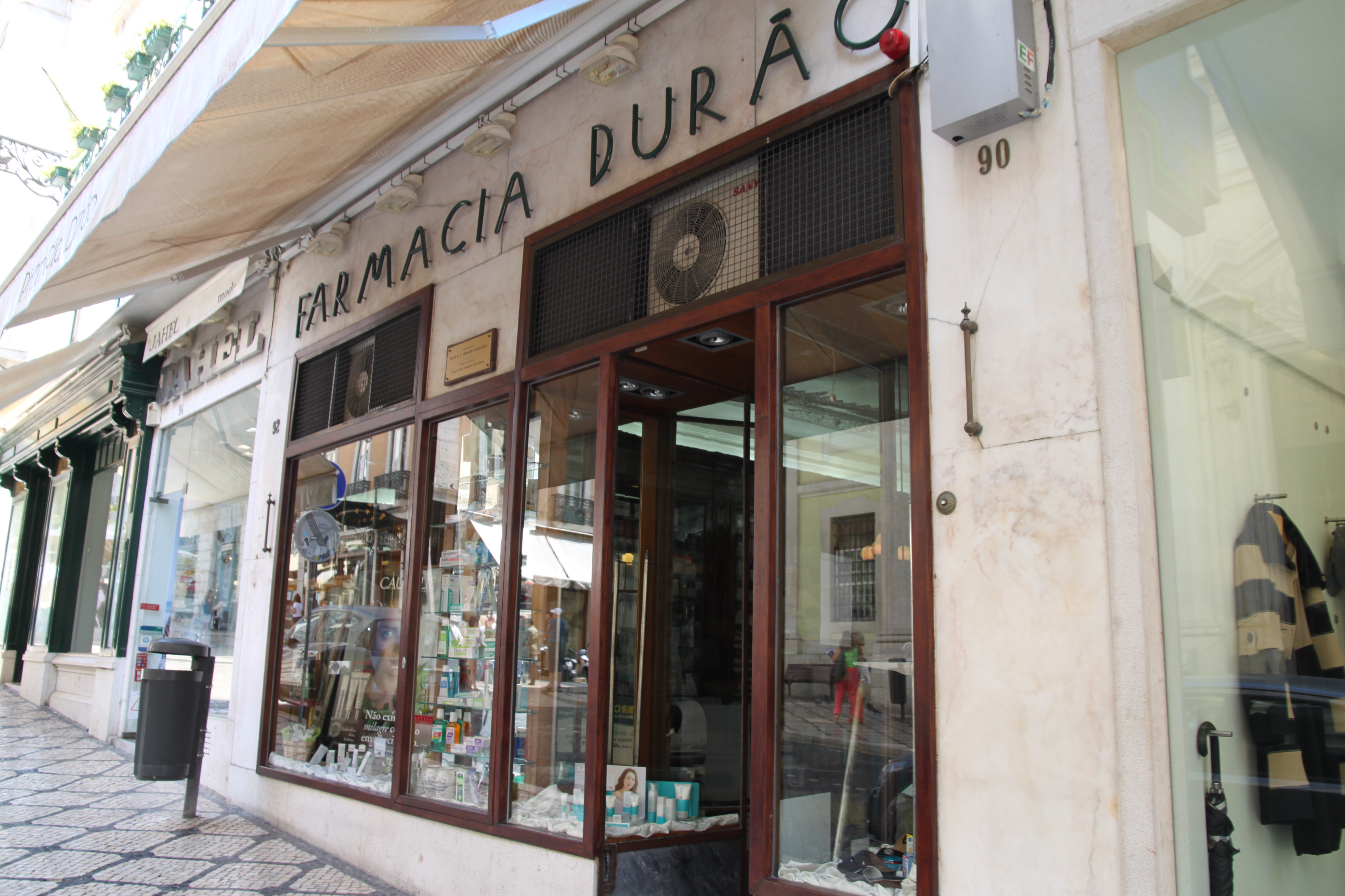 Farmácia Durão This file was uploaded for Wiki Loves Monuments in Portugal with the unique identifier 97020897.